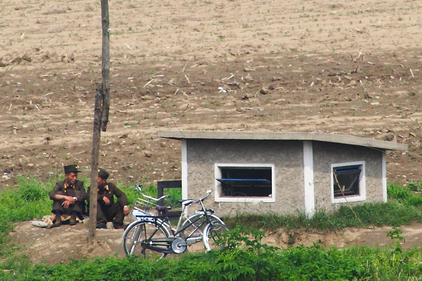 Casamatta nordcoreana Hushan Changcheng China, 2009-06-14